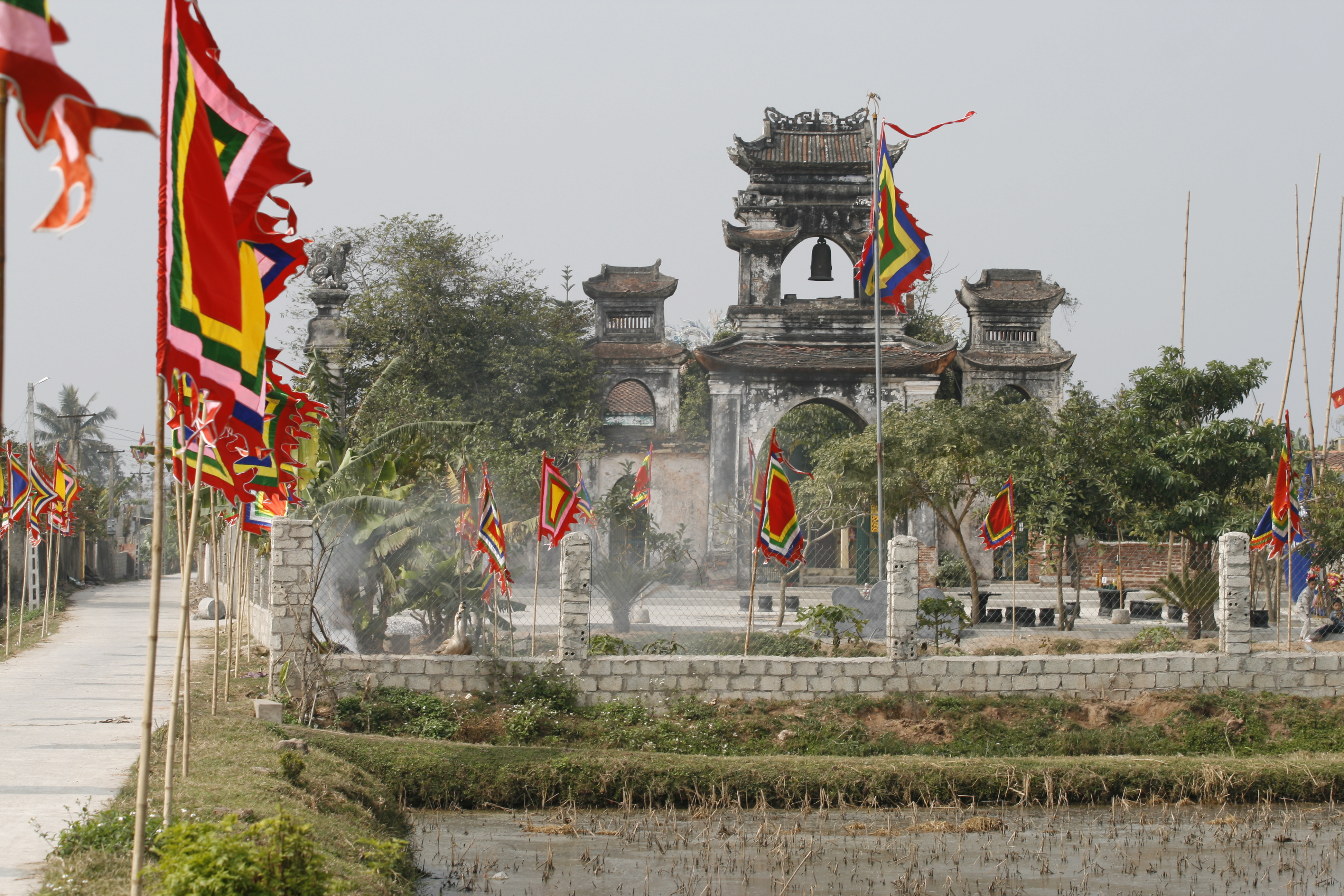 Đền thờ ở Đa Lộc, Hậu Lộc, Thanh Hóa